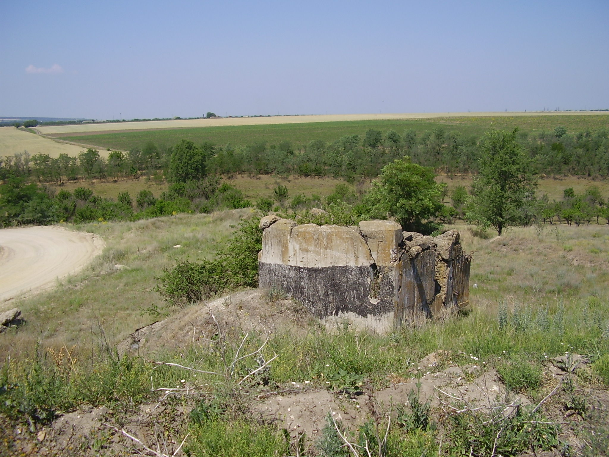 Дот в карьере с Парканы